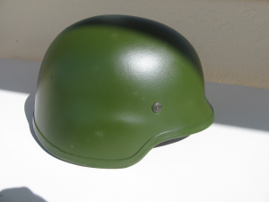 Der 1992 in der Bundeswehr (BW) eingeführte Gefechtshelm. Hier wird die Mitte der 1990er Jahre beim Bundesgrenzschutz (BGS) eingeführte Version gezeigt